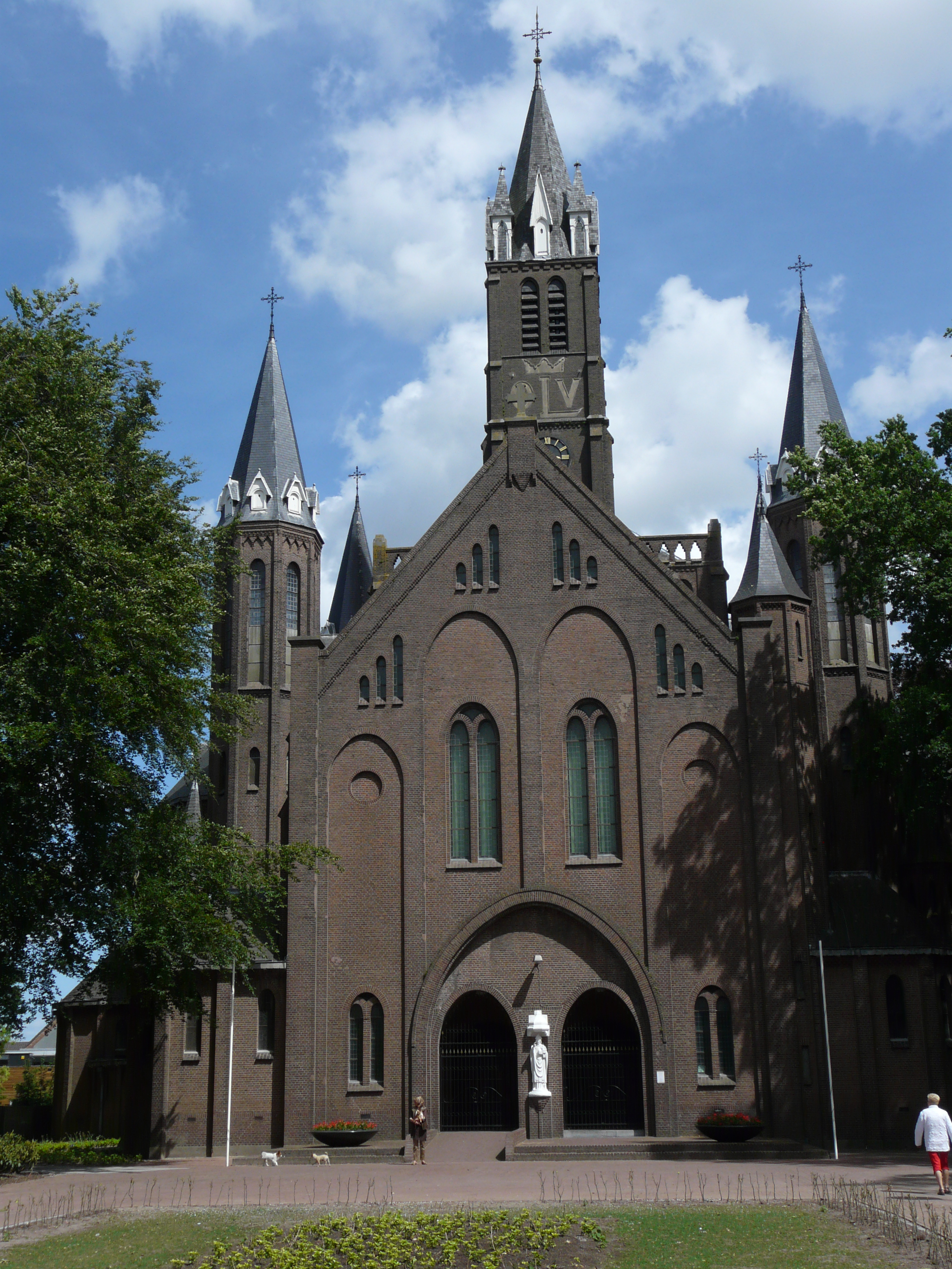 Zicht op een deel van de Sint-Willibrorduskerk in Sint Willebrord